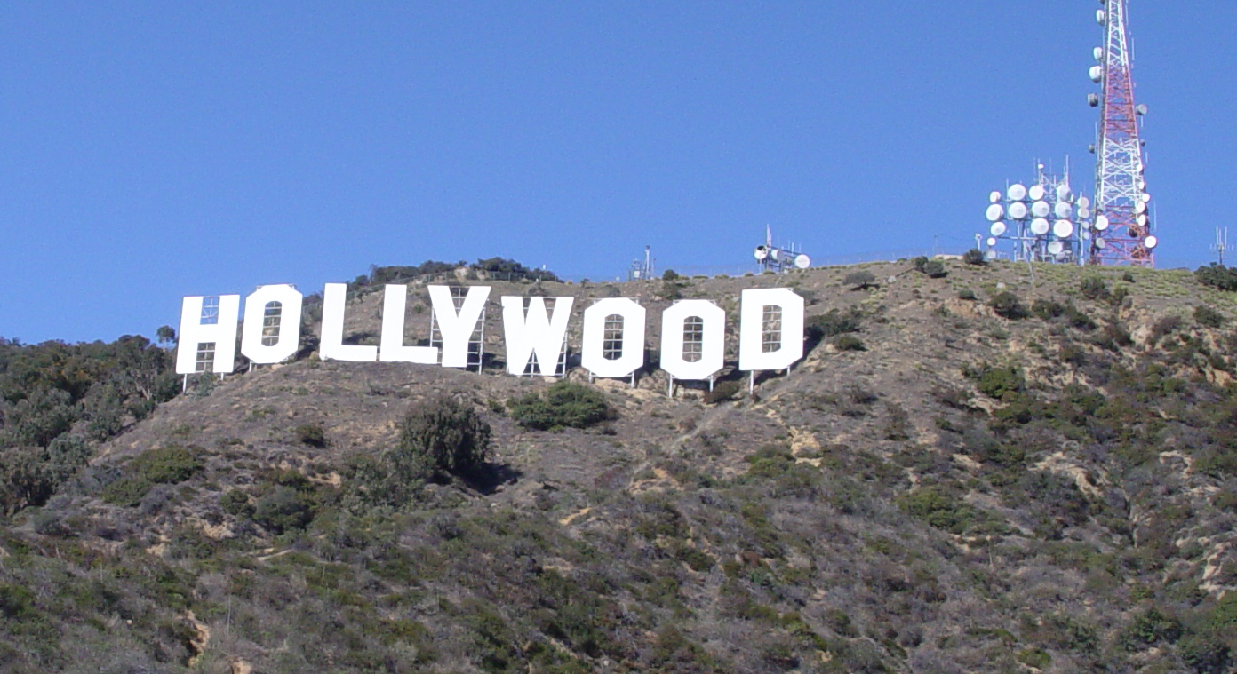 Hollywood-Sign in Hollywood/Los Angeles